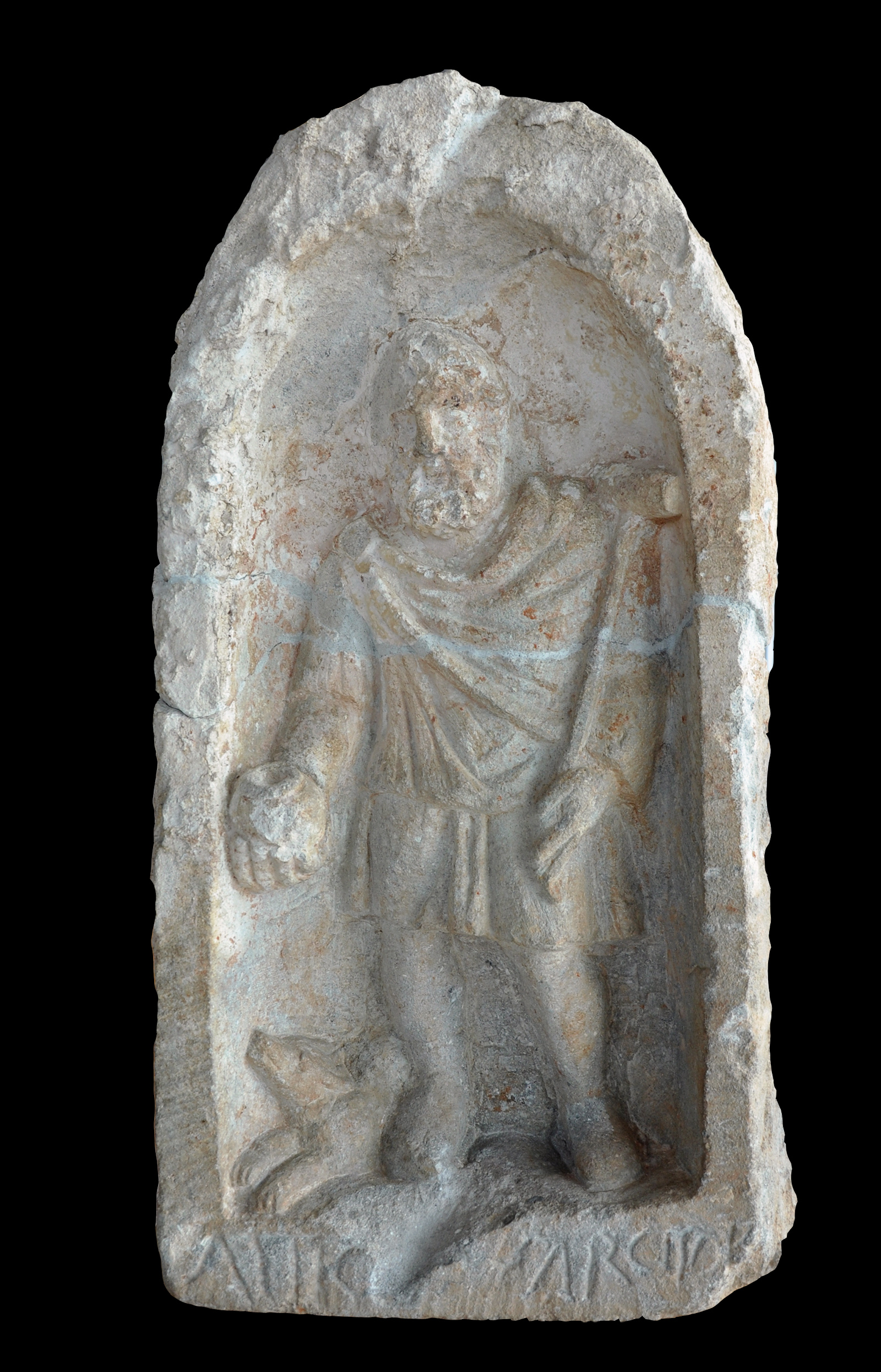 Statue en haut-relief de Sucellus, provenant de la "Maison de Sucellus" 2ème siècle; site et musée de saint-Romain-en-Gal. L'inscription à la base porte : ATTICUS SARCIS D R ( Atticus Sarcis D(onum) R(eddit): Atticus fils de Sarcus a fait ce don en retour.) Le dieu tient un pot (olla) et un maillet, et un chien est couché à ses pieds.